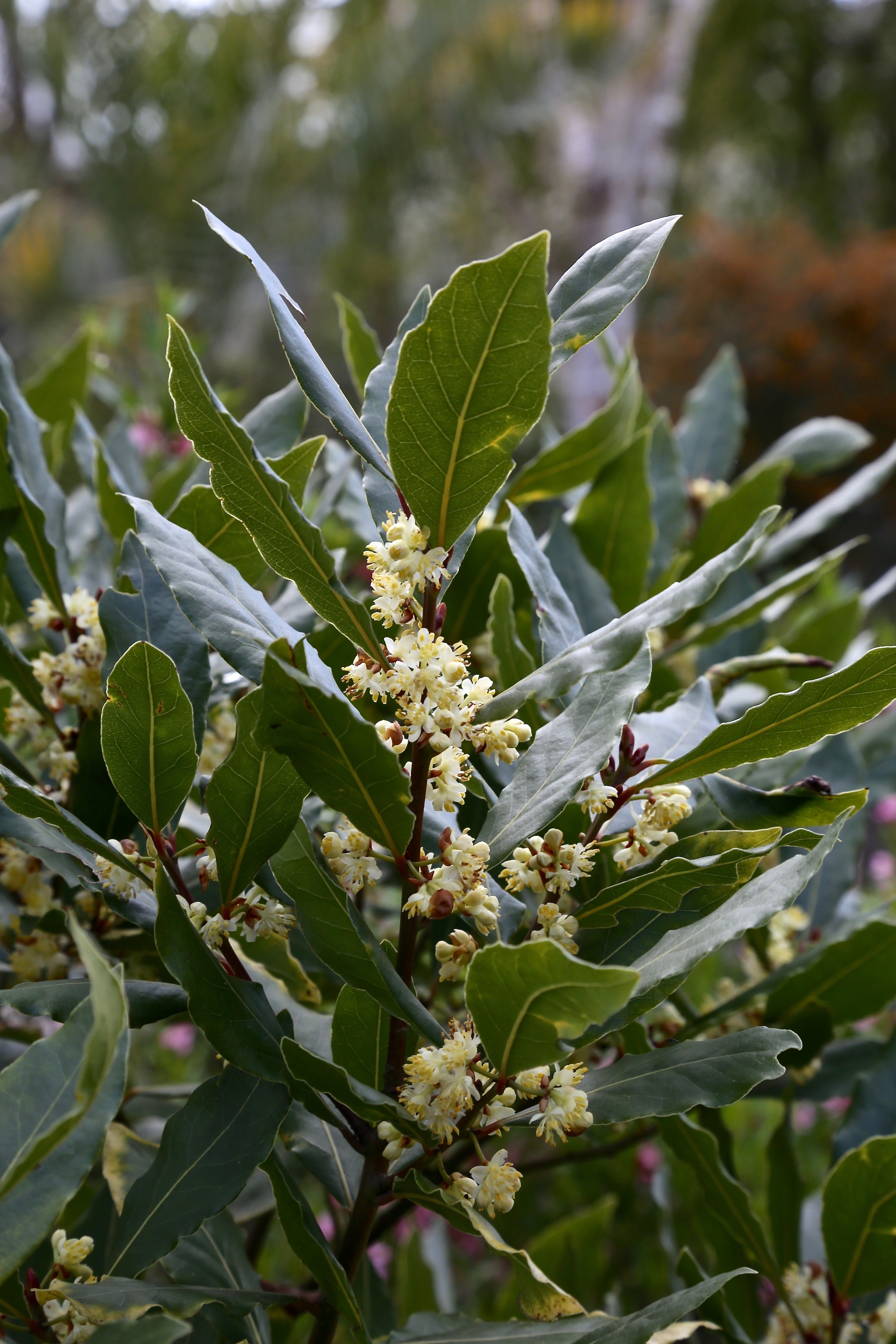 Hortus Botanicus, Amsterdam